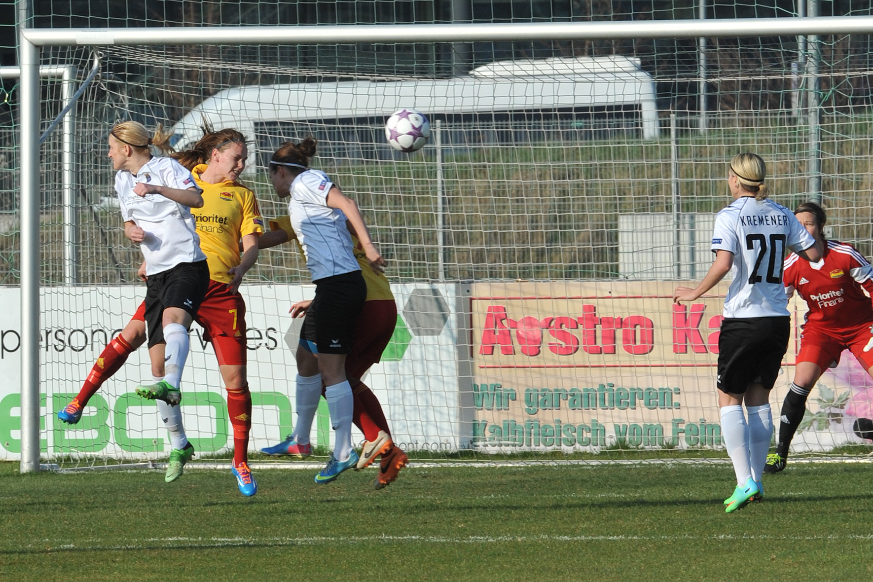 UEFA Women's Champions League 2013/14 SV Neulengbach - Tyresö FF Neulengbach, 29. März 2014 Lisa Dahlkvist